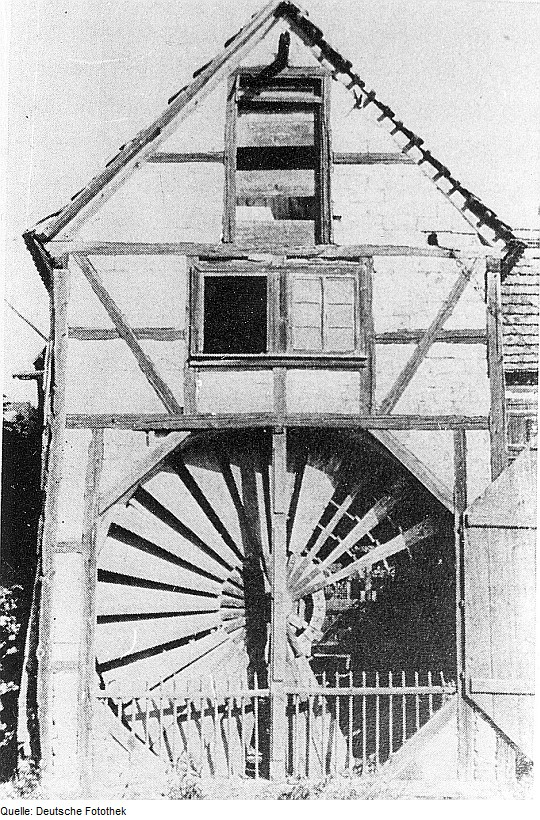 Original image description from the Deutsche Fotothek Dresden-Podemus. vertikal turbinenförmiges Windrad in einem Fachwerkgebäude, aus: Sächs. Gebirgsheimat 1979